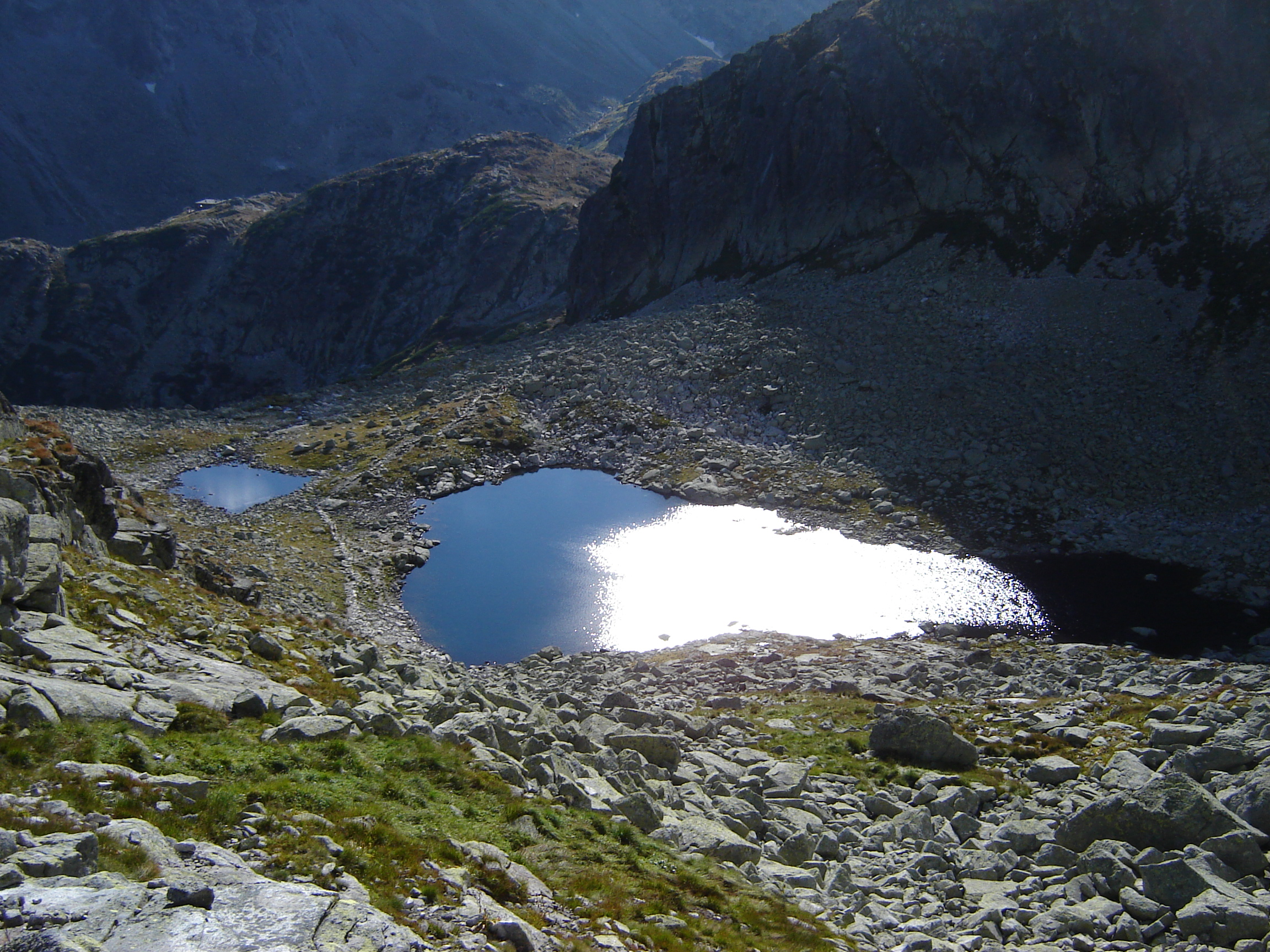 Sivé plesá